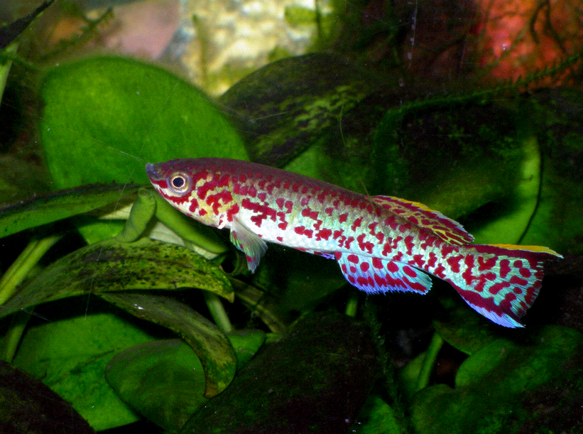 Fundulopanchax gardneri (male)